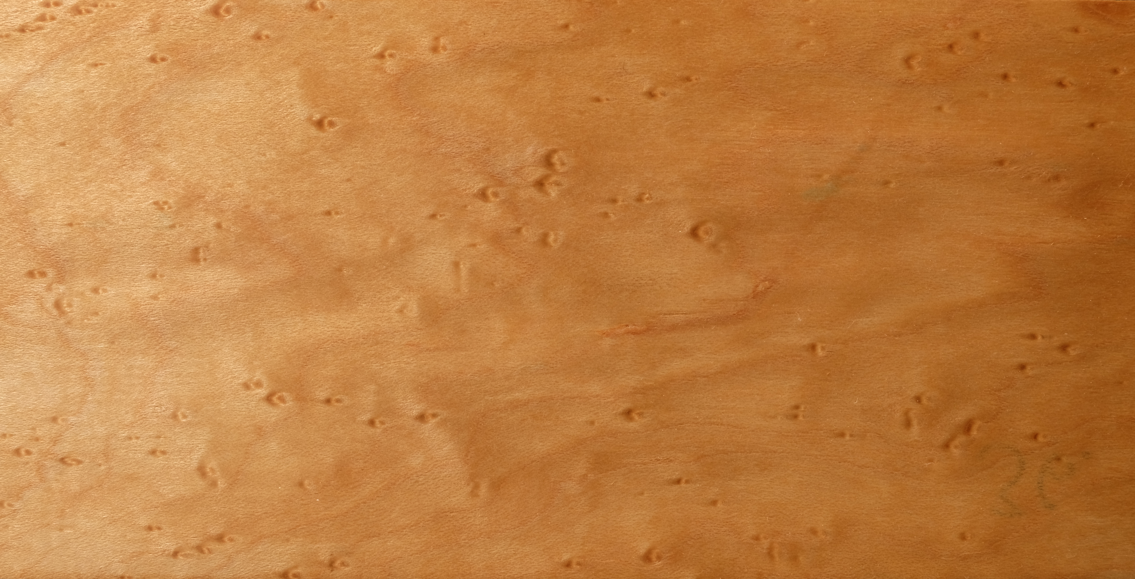 gemessertes Furnier; Holzart: AHZ, Zuckerahorn, Vogelaugenahorn, Hard maple, Sugar mapel